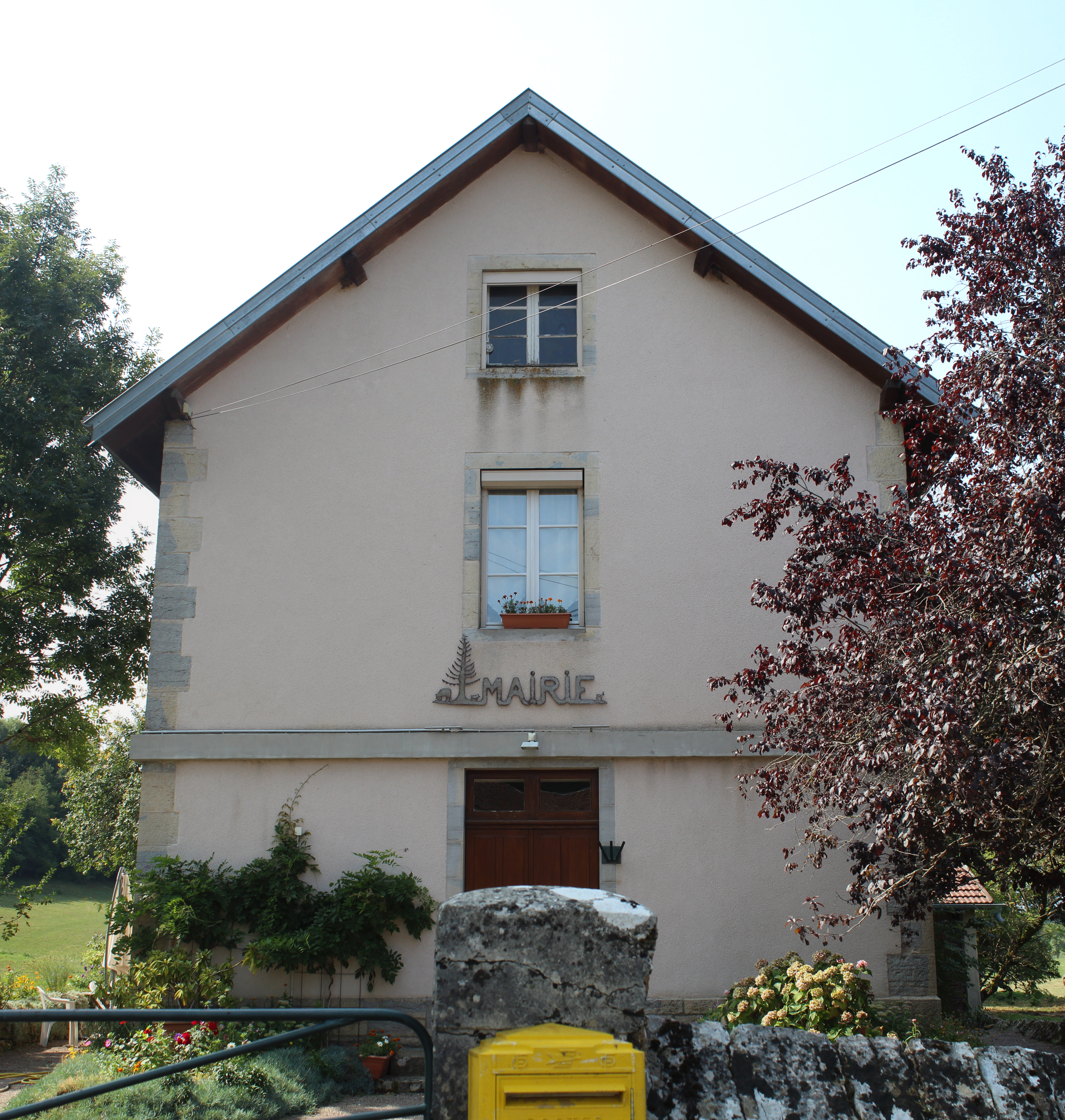 Mairie de Geraise.